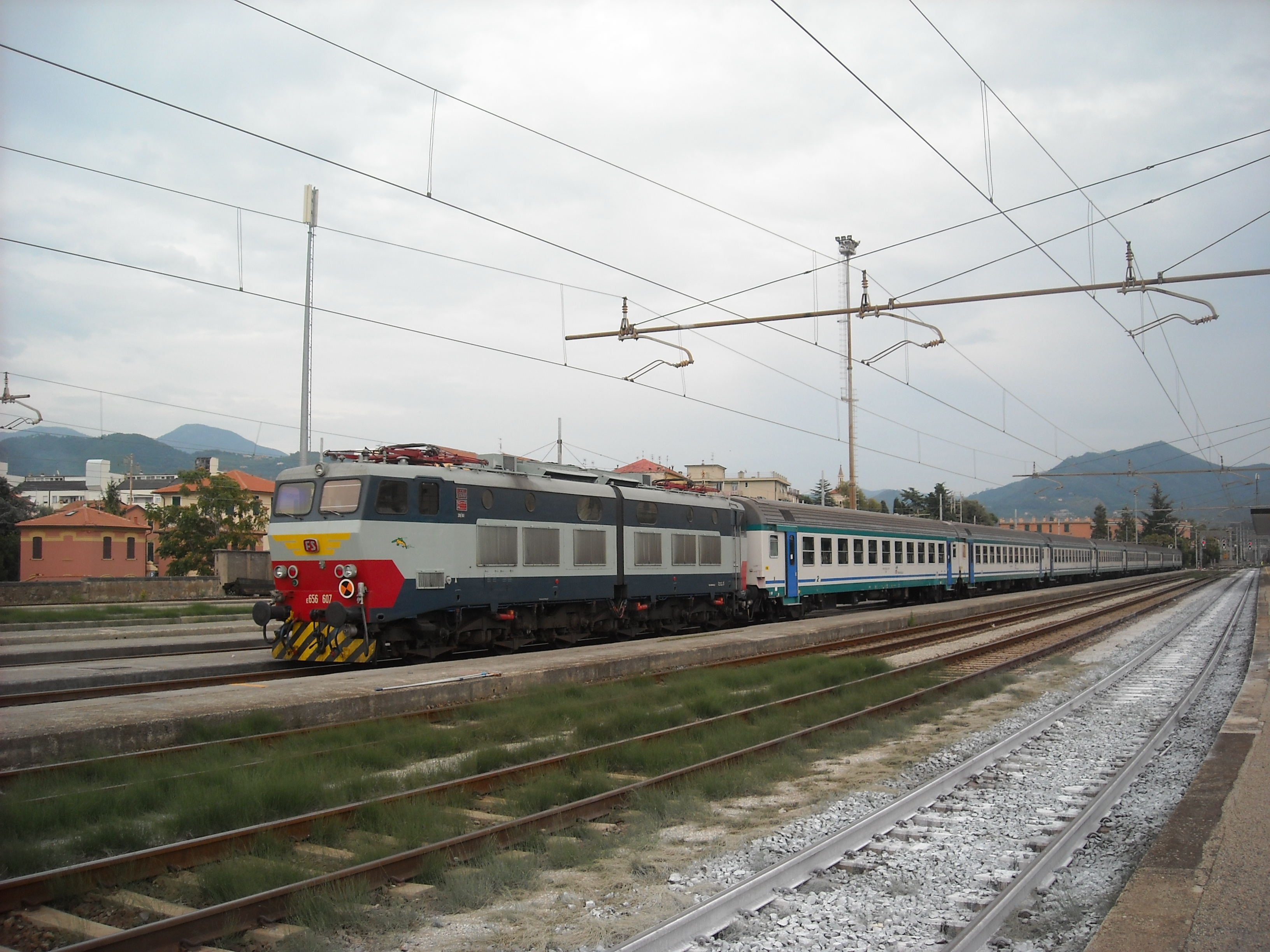 Locomotiva elettrica E.656.607 delle Ferrovie dello Stato, in livrea storica, in sosta a Sestri Levante